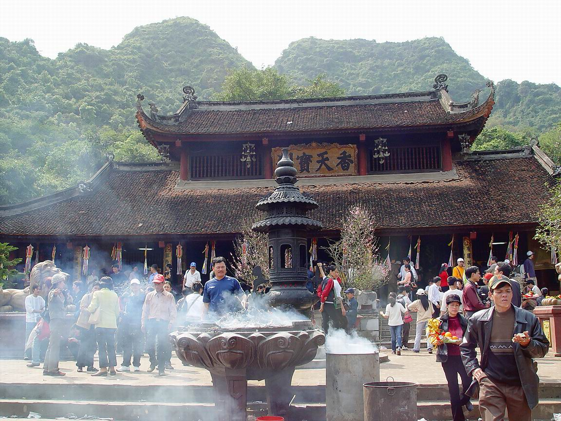 Thiên Trù